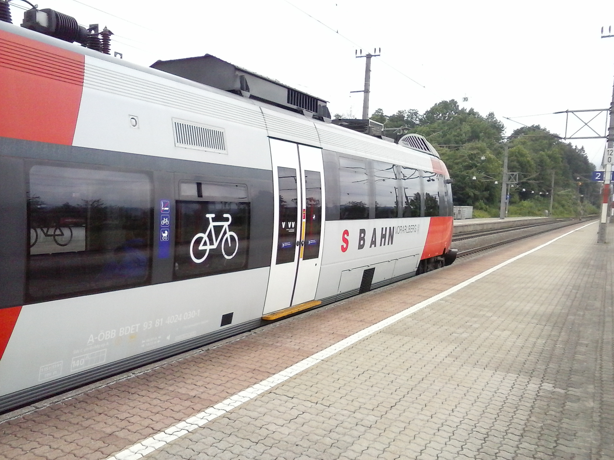 ÖBB 4024 "S-Bahn Vorarlberg" im Bahnhof Kirchbichl in Tirol